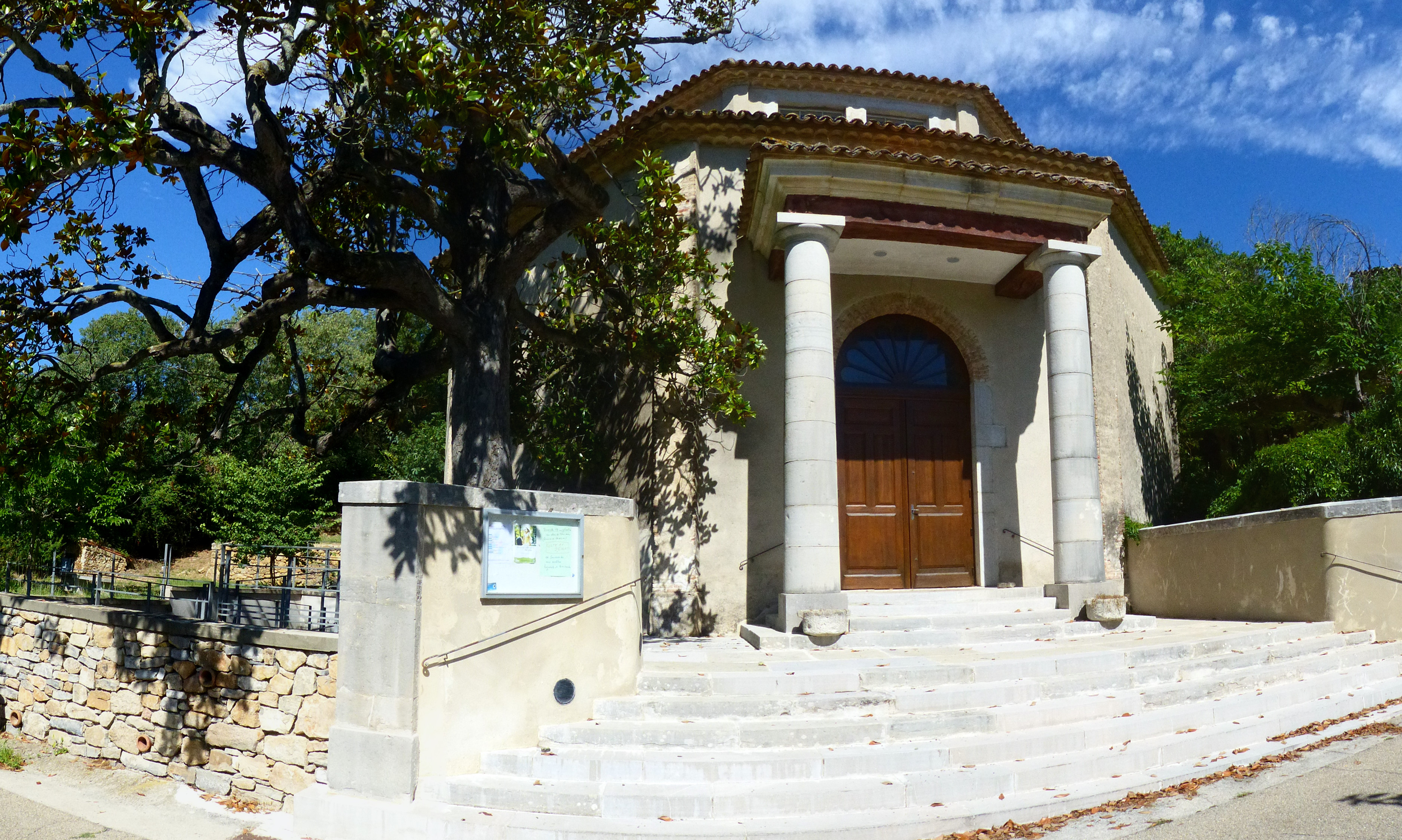 Temple octogonal de Monoblet (Gard)